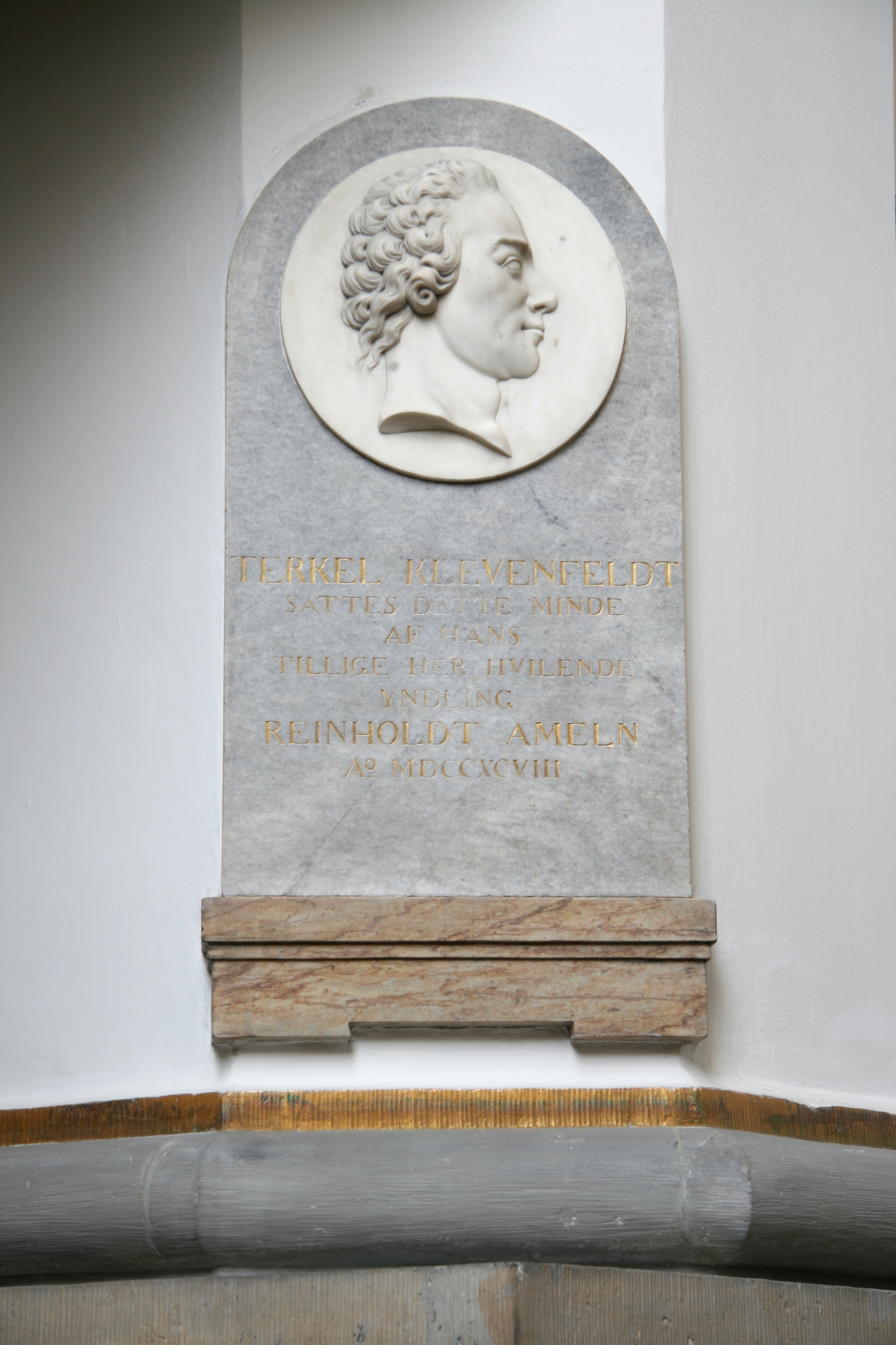 Trinitatis Kirke, Copenhagen, Denmark. Terkel Klevefeldts epitafium. 1798.